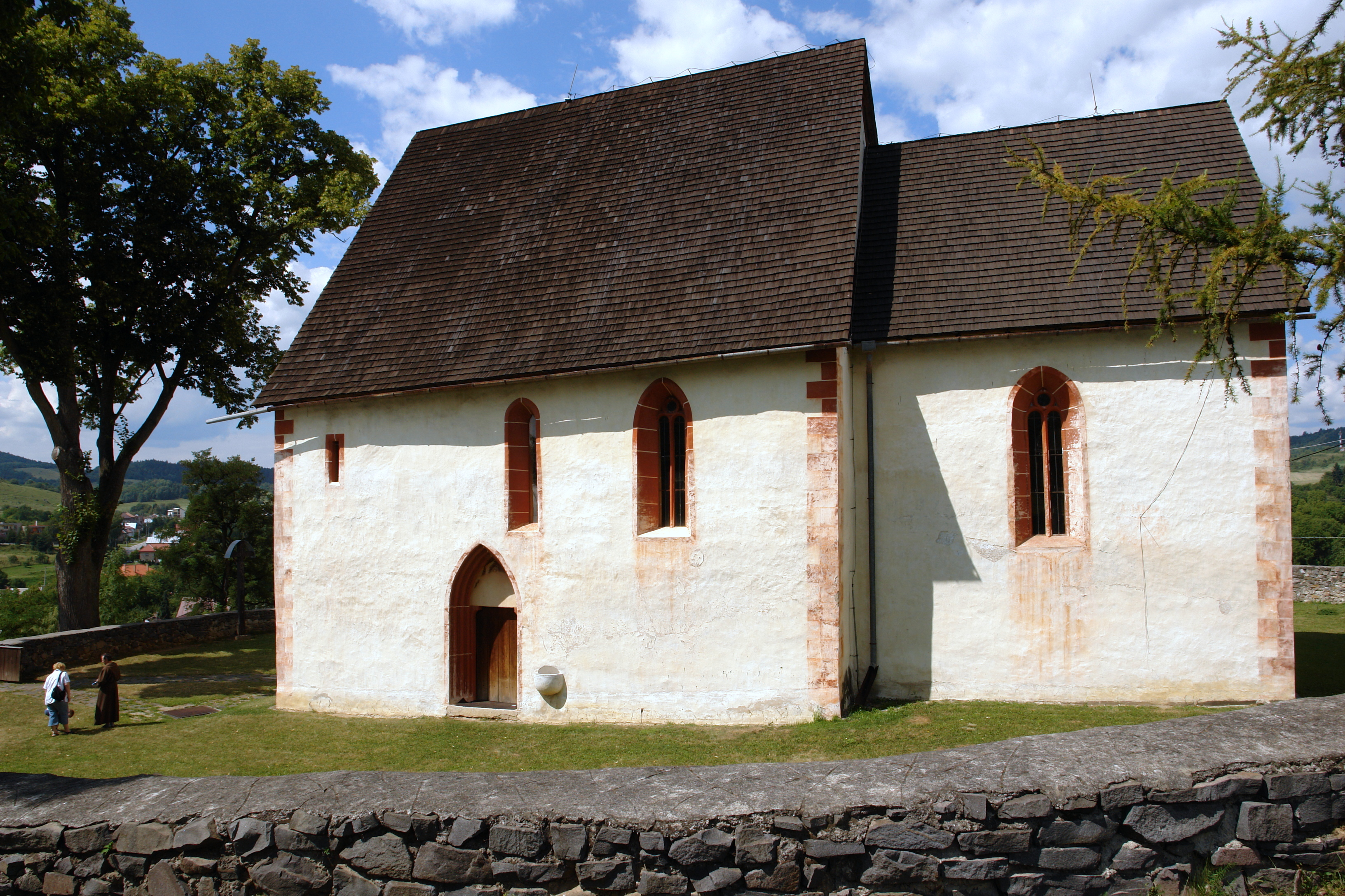 Kostol svätého Františka z Assisi v Ponikách (okr. Banská Bystrica); celkový pohľad